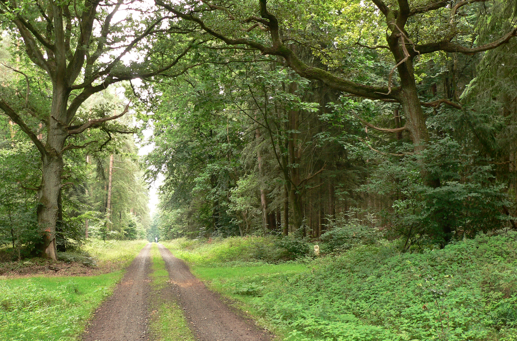 Waldweg im Grinderwald, rechts der Jagen 48, erkenntlich am Stein